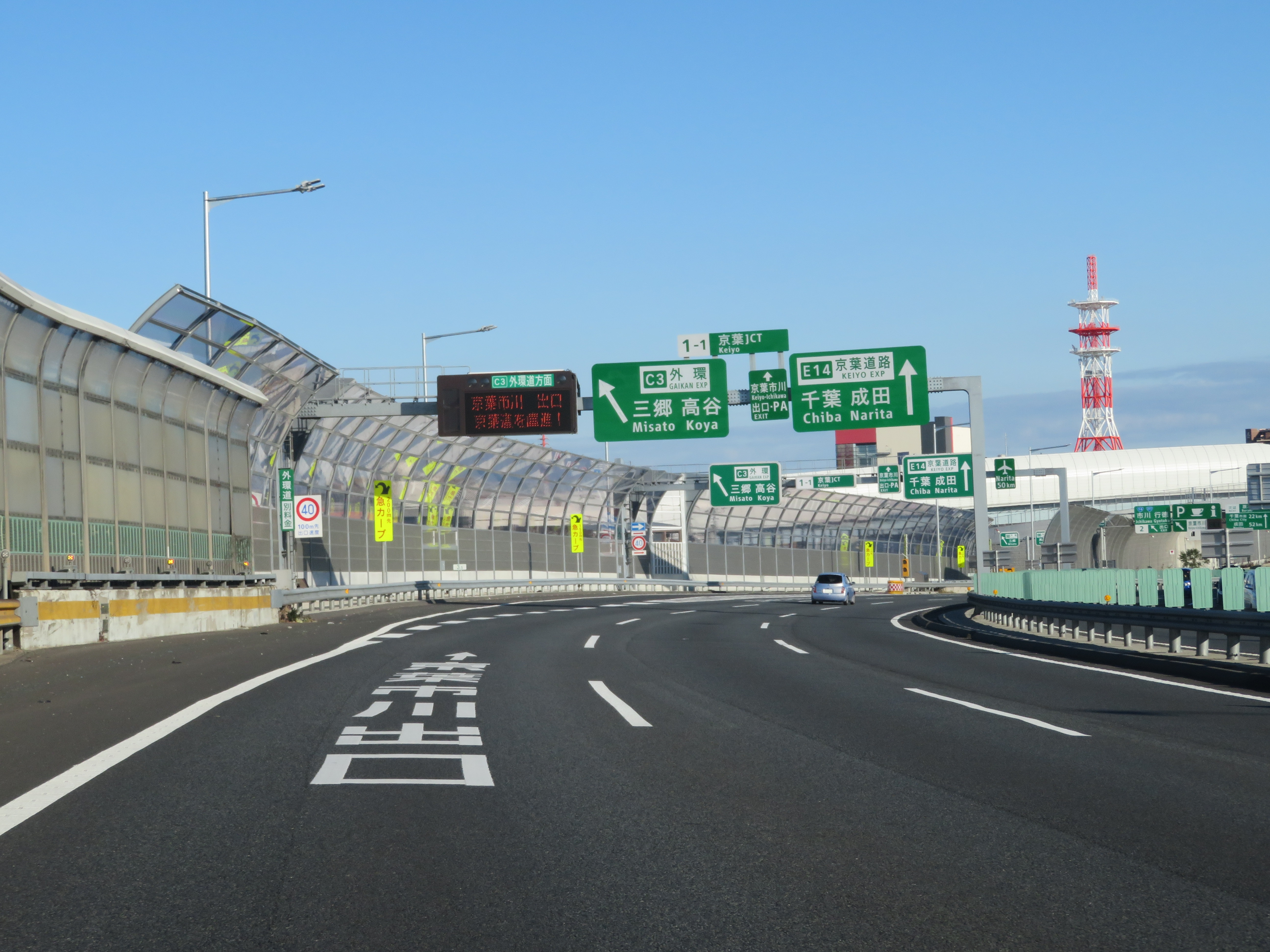 京葉道路京葉ＪＣＴ分岐付近（篠崎ＩＣ方面側から撮影） Canon PowerShot SX720 HS